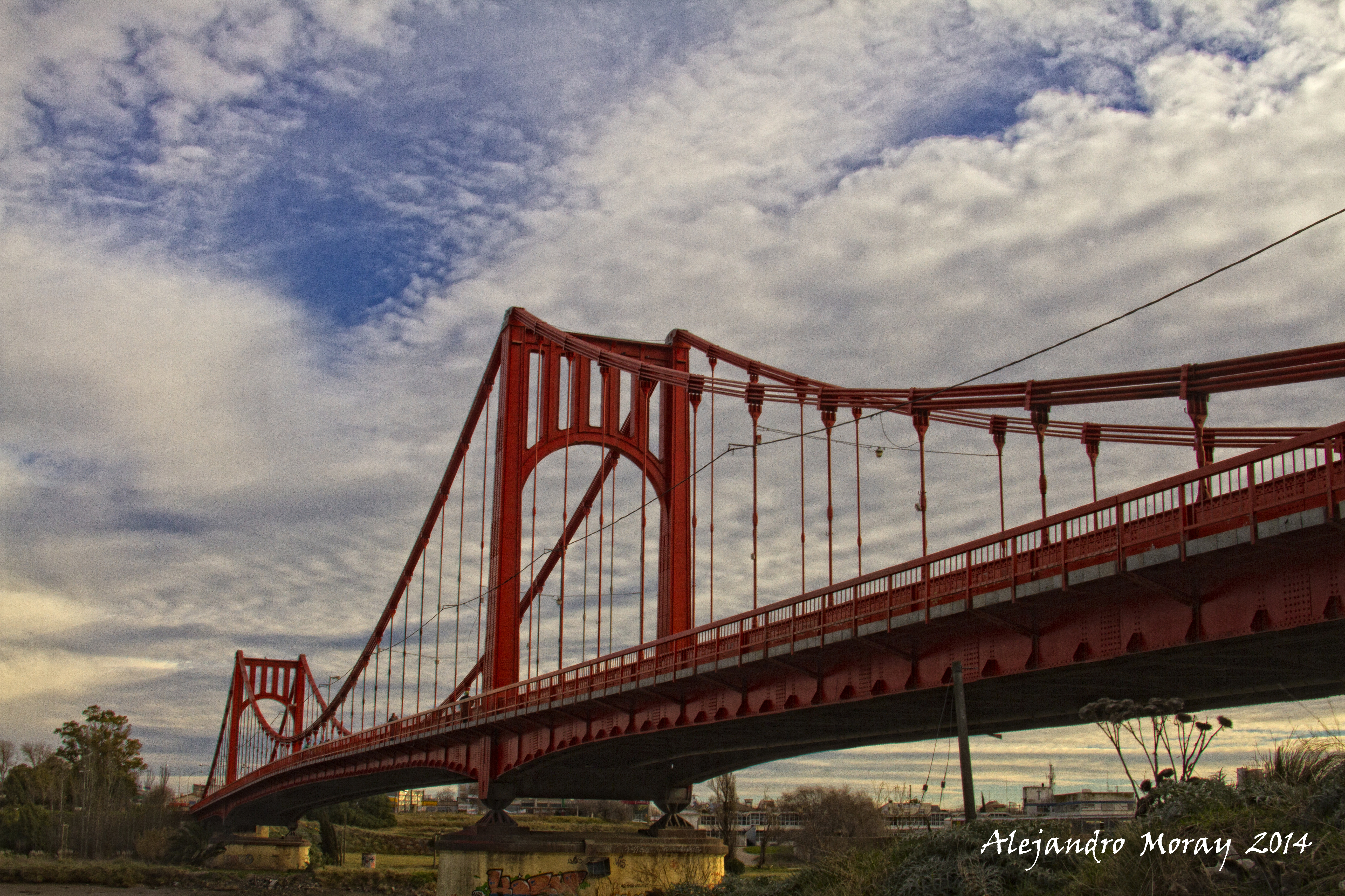 Puente Colgante que une las ciudades de Necochea y Quequén, sobre el Río Quequén, cerca de su desembocadura en el Mar Argentino. Partido de Necochea, Provincia de Buenos Aires, República Argentina